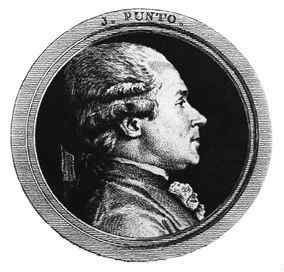 Jan Václav Stich (1746 - 1803), Český virtuos na lesní roh, houslista a hudební skladatel.